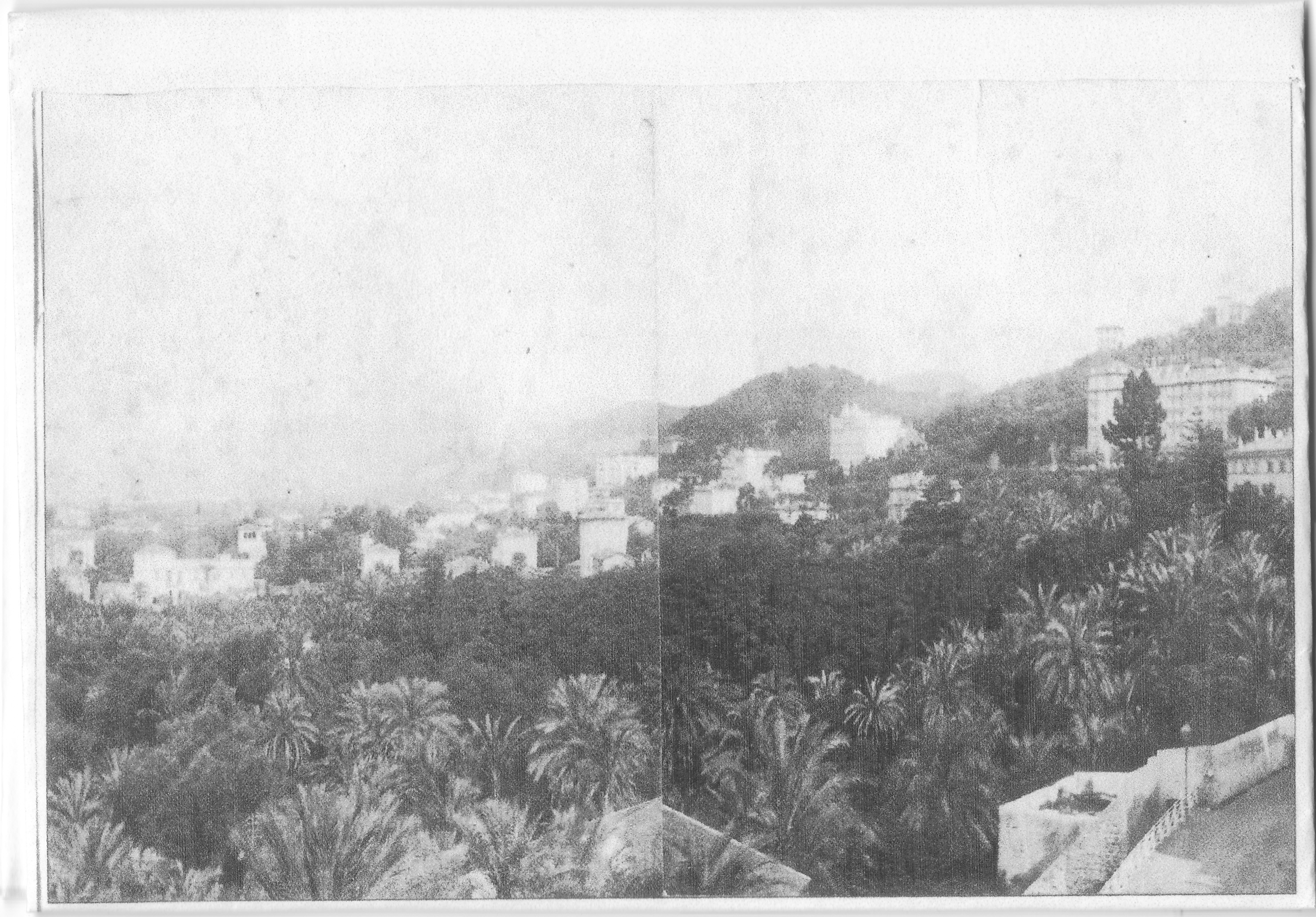 Giardino Moreno visto da Bordighera vecchia